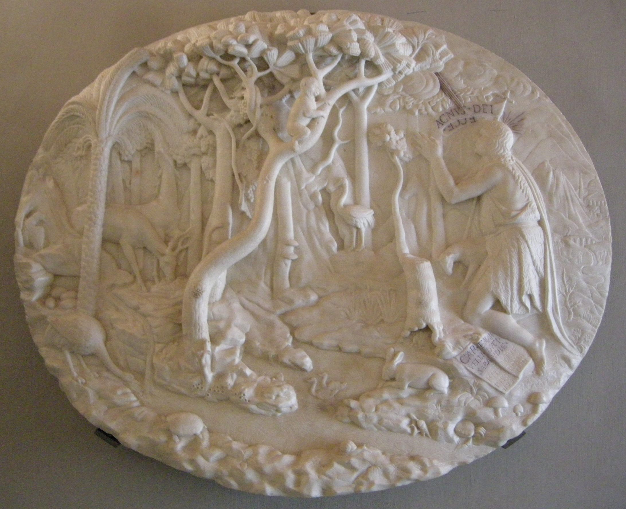 Pietro paolo olivieri, san giovanni battista nel deserto